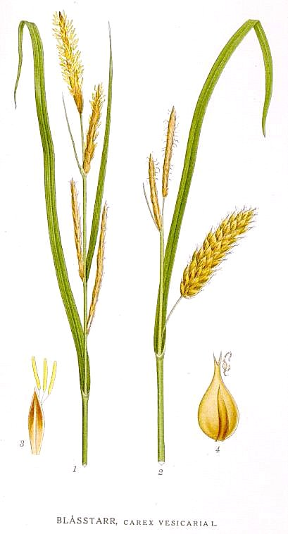 Original Description Blåsstarr, Carex vesicaria L.